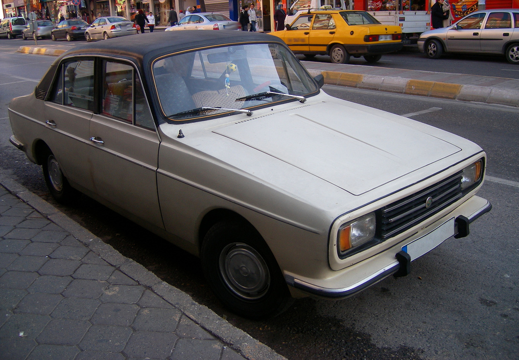 Anadol SL (A2)- Üsküdar, Istanbul